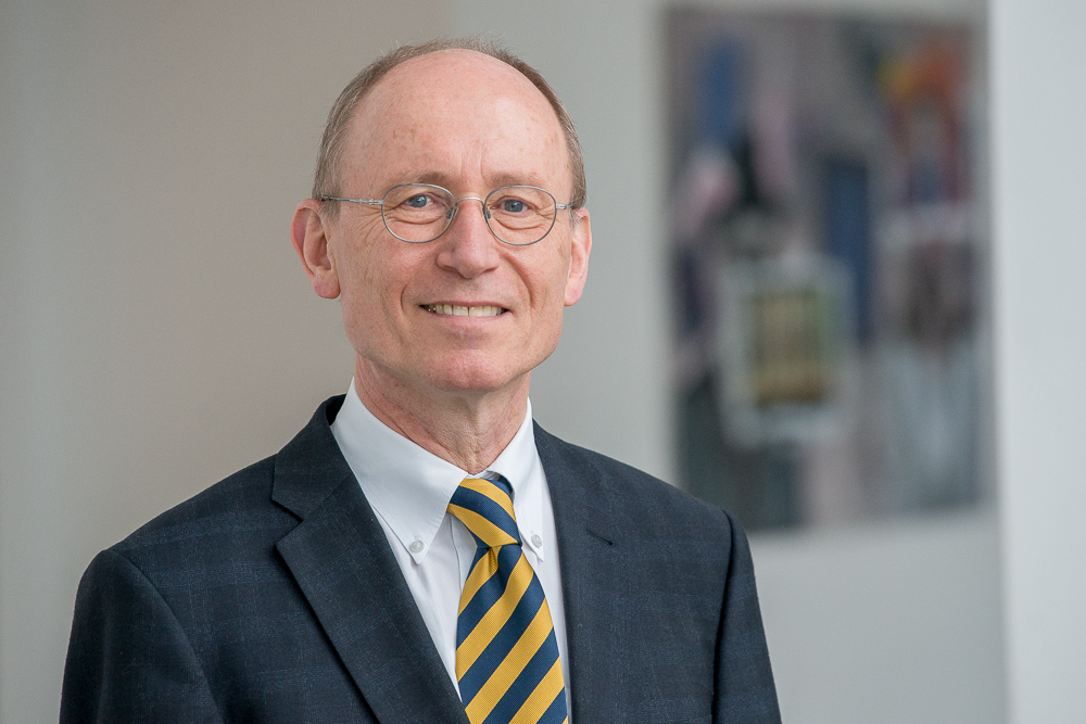 Portrait des Präsidenten der Carl von Ossietzky Universität Oldenburg Prof. Dr. Dr. Hans Michael Piper